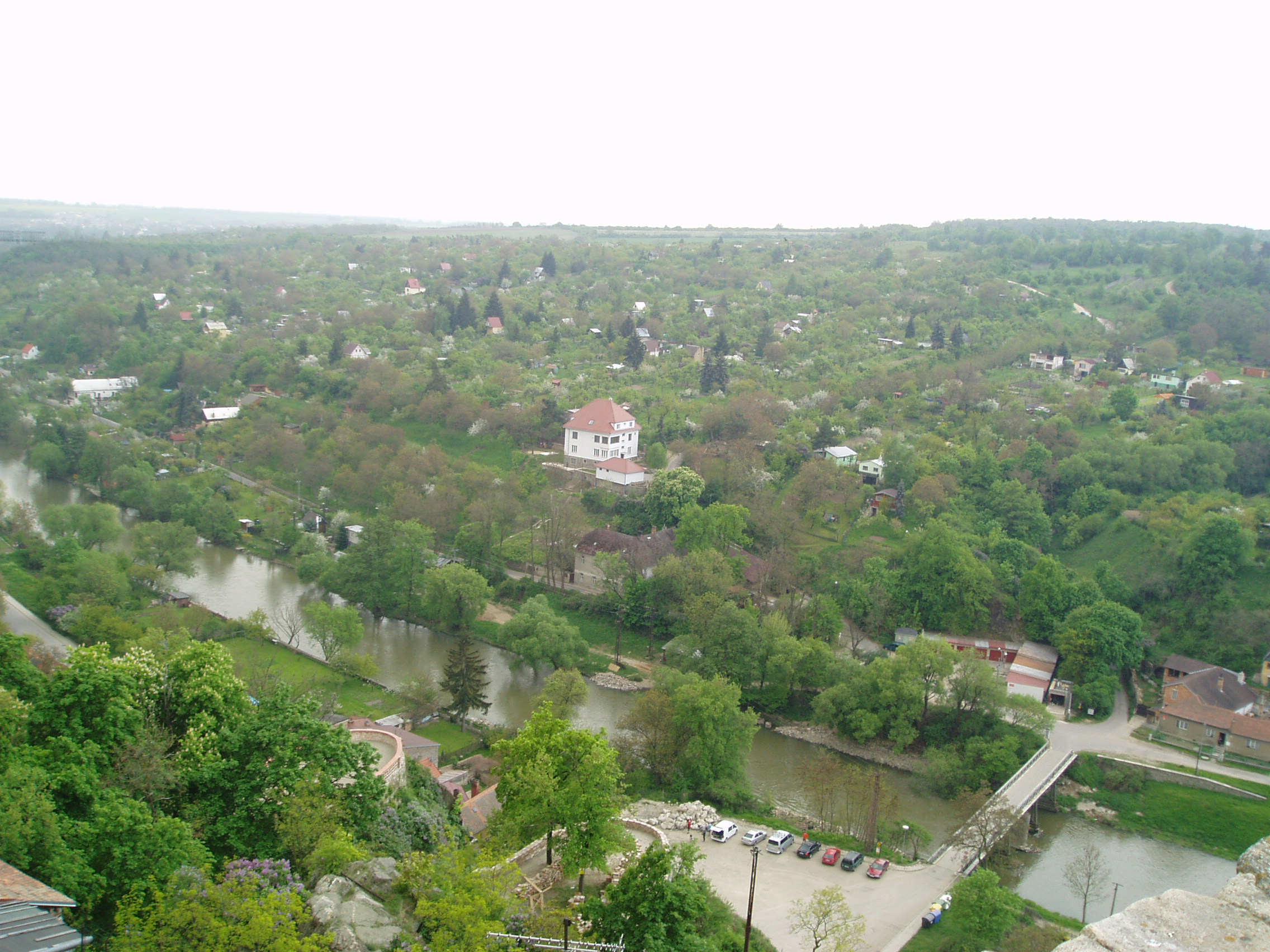 Foto van buitengebied Znojmo. Zelfgemaakte foto tijdens uitwisseling met Znojmo. gemaakt op 7 mei 2006